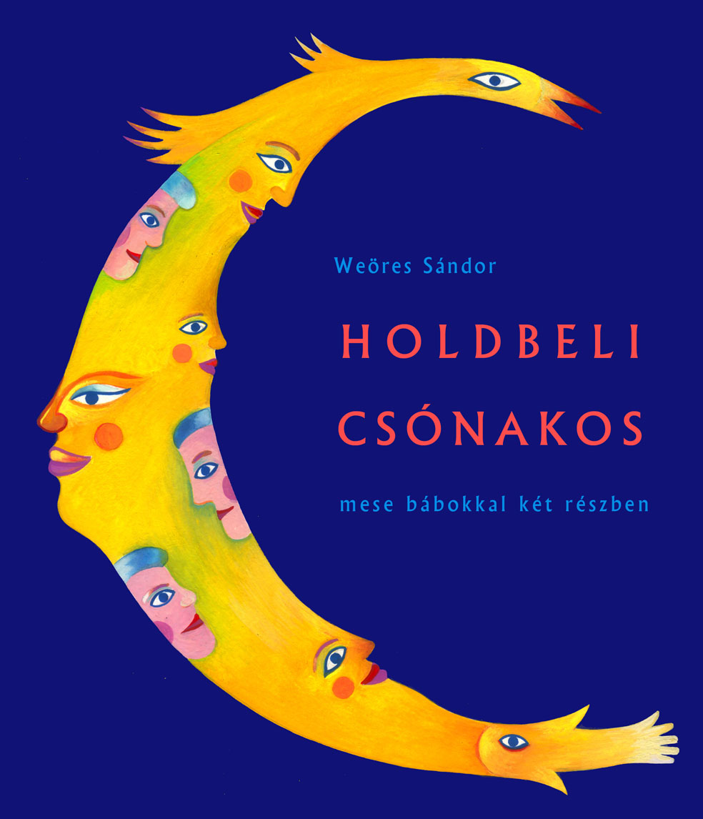 Weöres Sándor: Holdbeli csónakos. Keresztes Dóra plakátja a Nemzeti Színház 2003-as előadásához